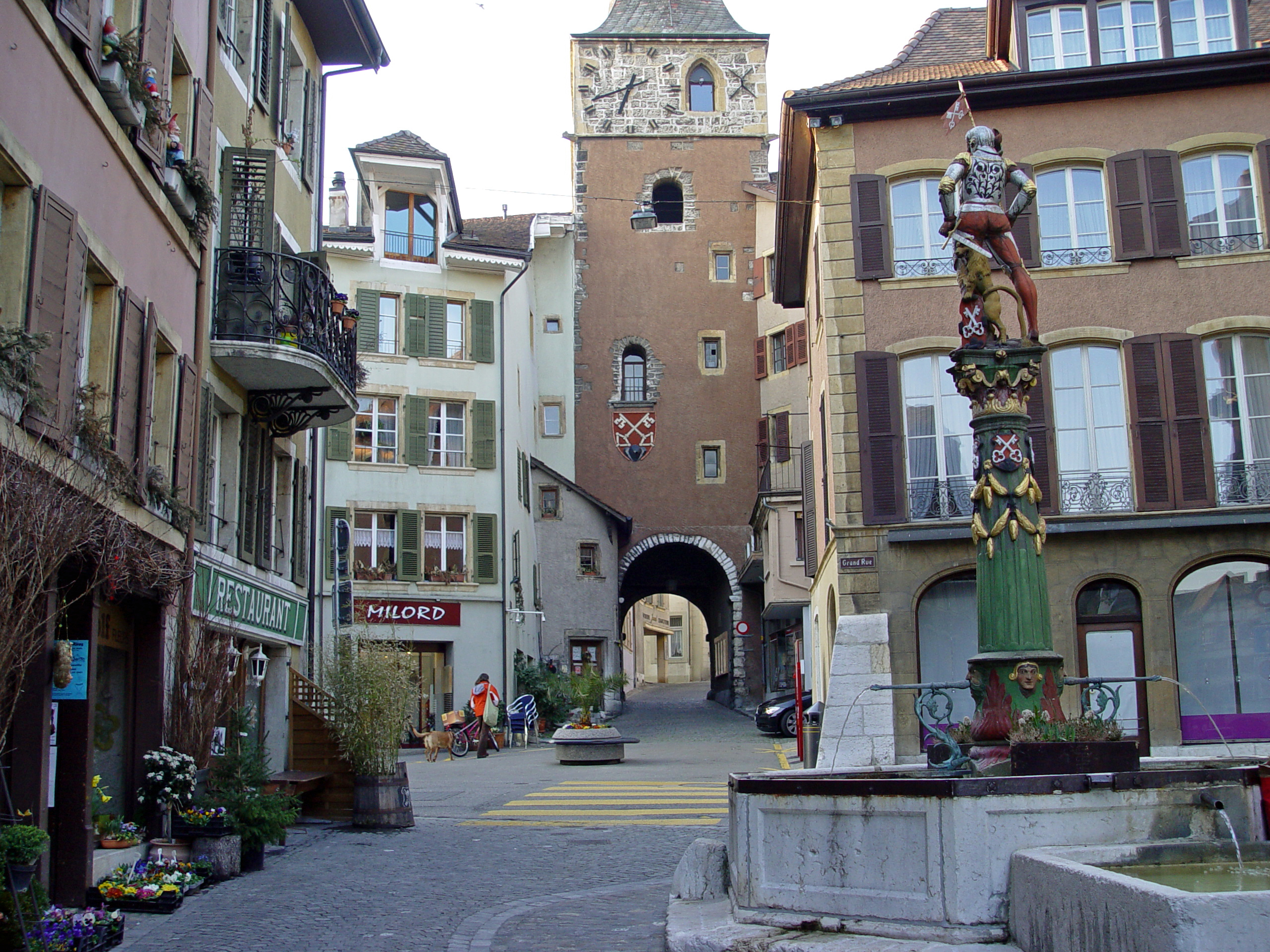 Innenstadt von La Neuveville